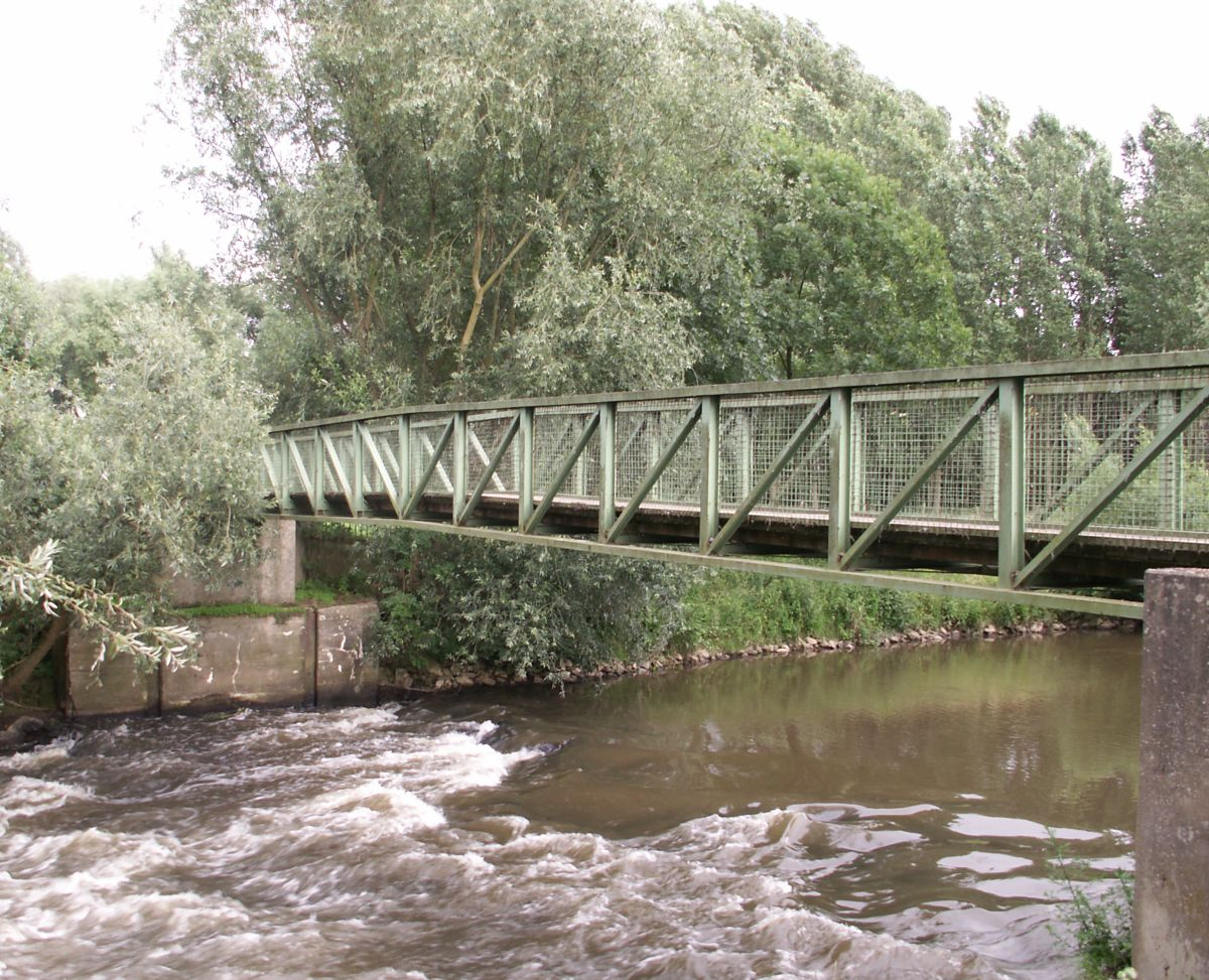 Landschafts-Motive aus dem Heinsberger Land